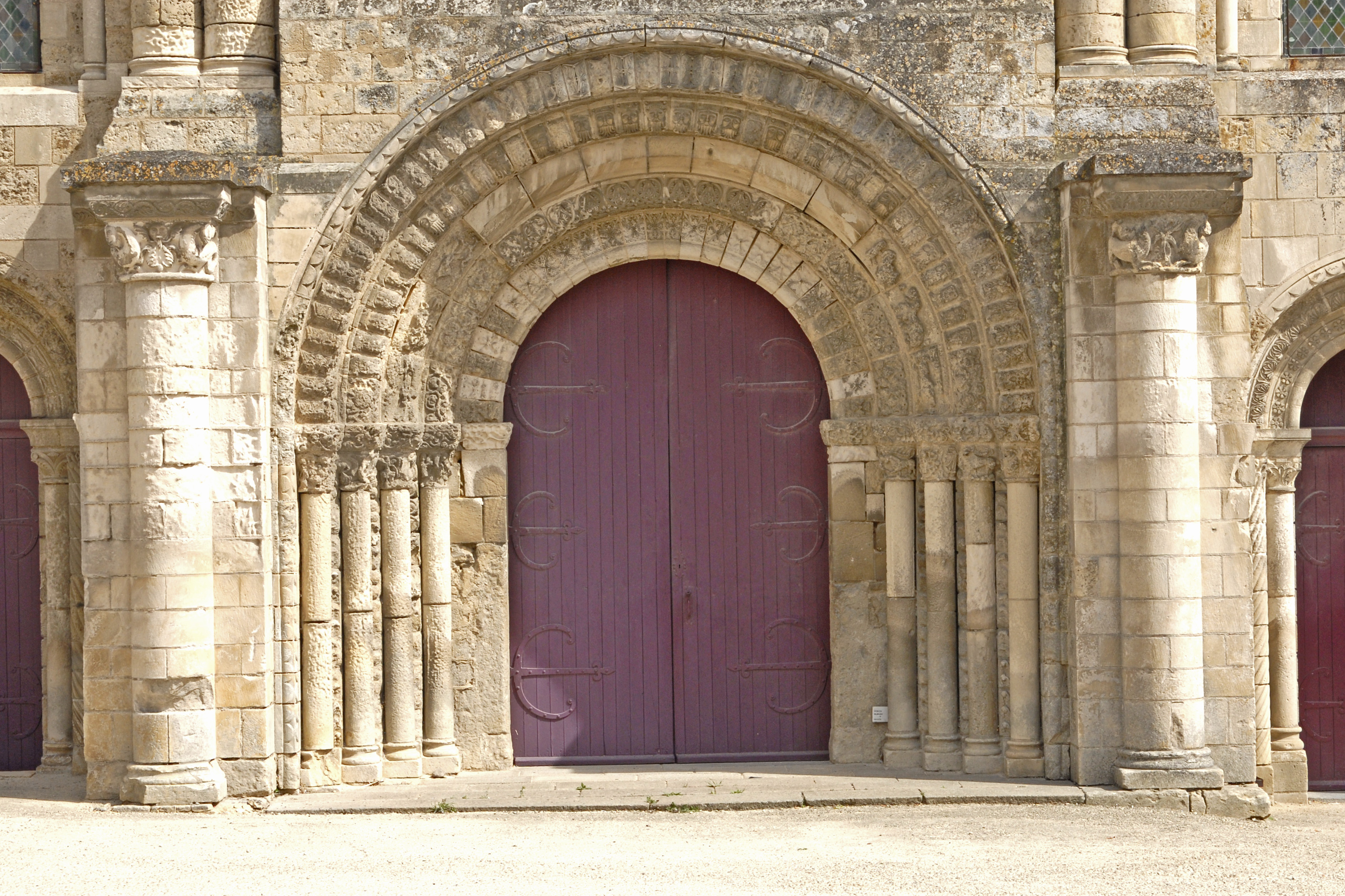 Saint-Jouin-de-Marnes, Archivolten- Hauptportal